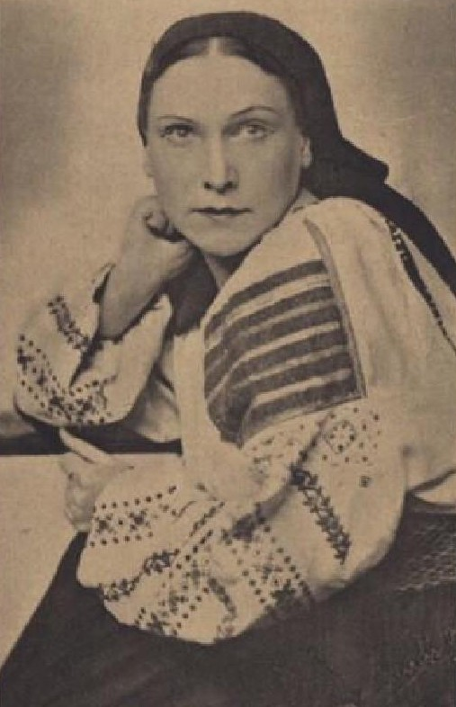 Oľga Borodáčová (1899-1986), slovenská herečka